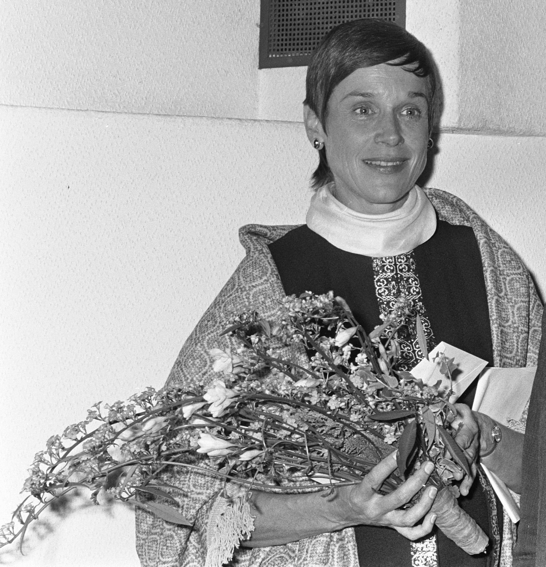 David Roelprijs uitgereikt aan Lies Meyers Cosijn in het Rijksmuseum, 1972